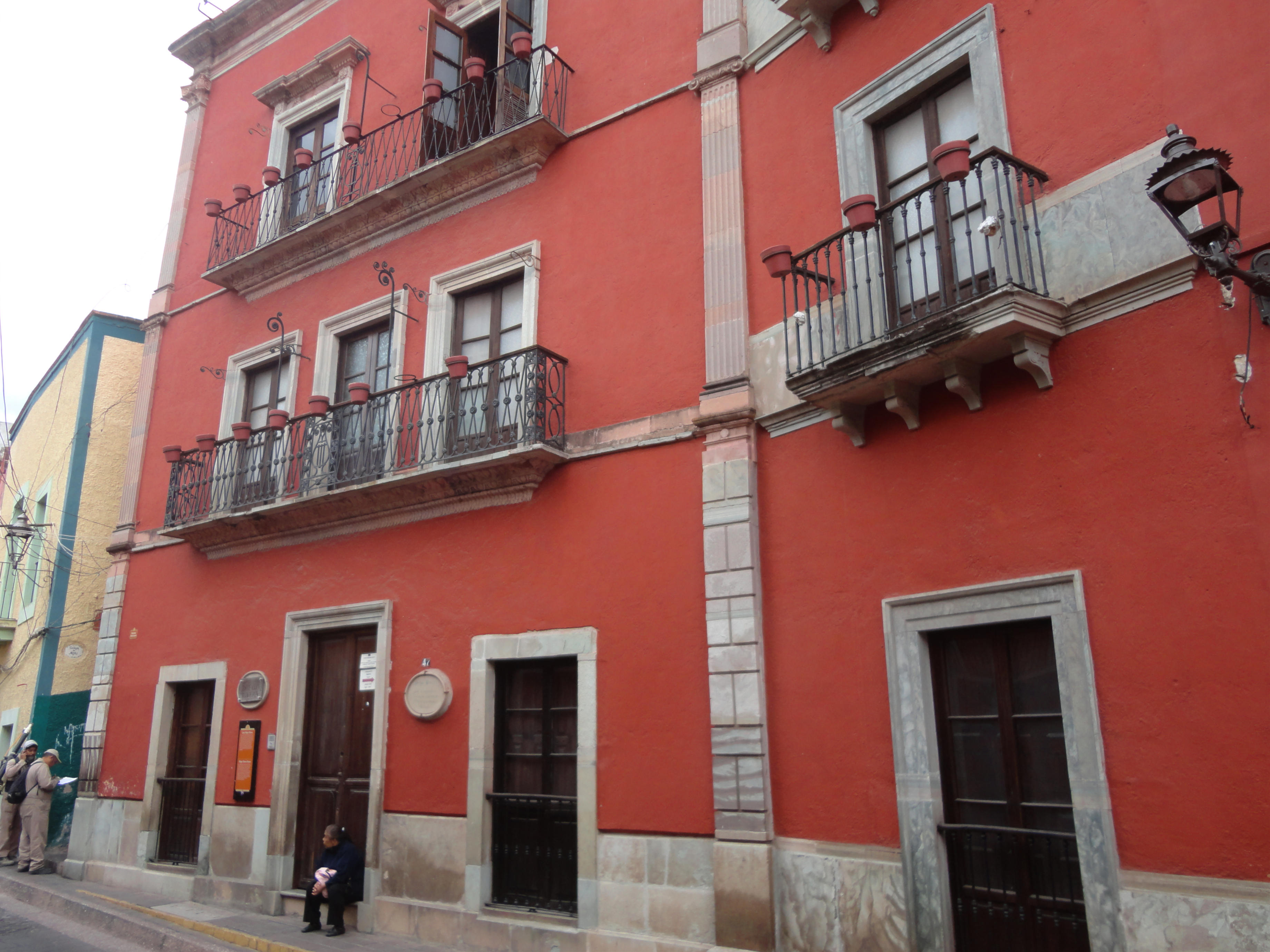 Museo Casa Diego Rivera, Guanajuato Capital, Guanajuato, México.